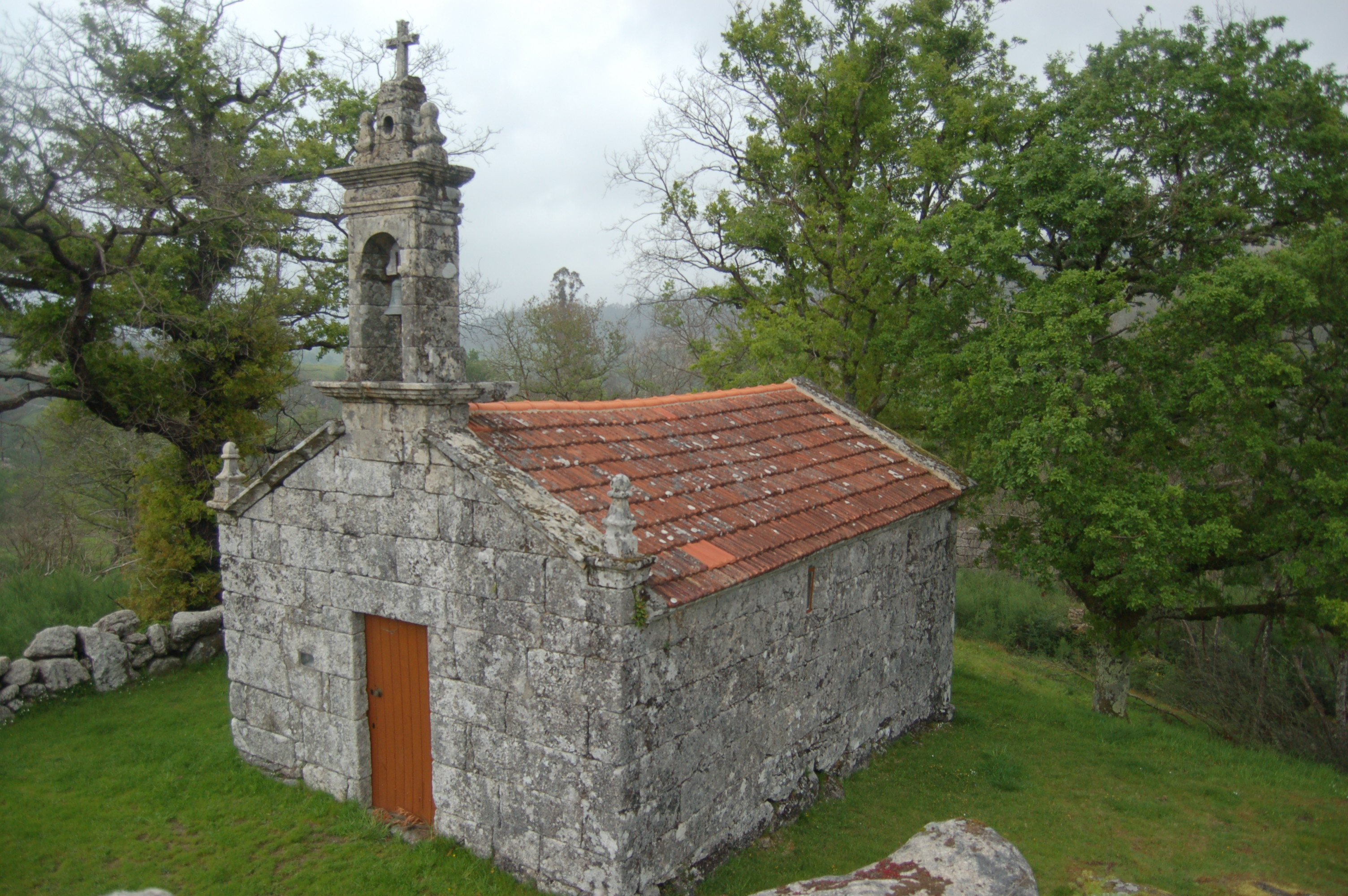 Capela de San Lourenzo (s. XVIII) en Serrapio (Pedre, Cerdedo-Cotobade)